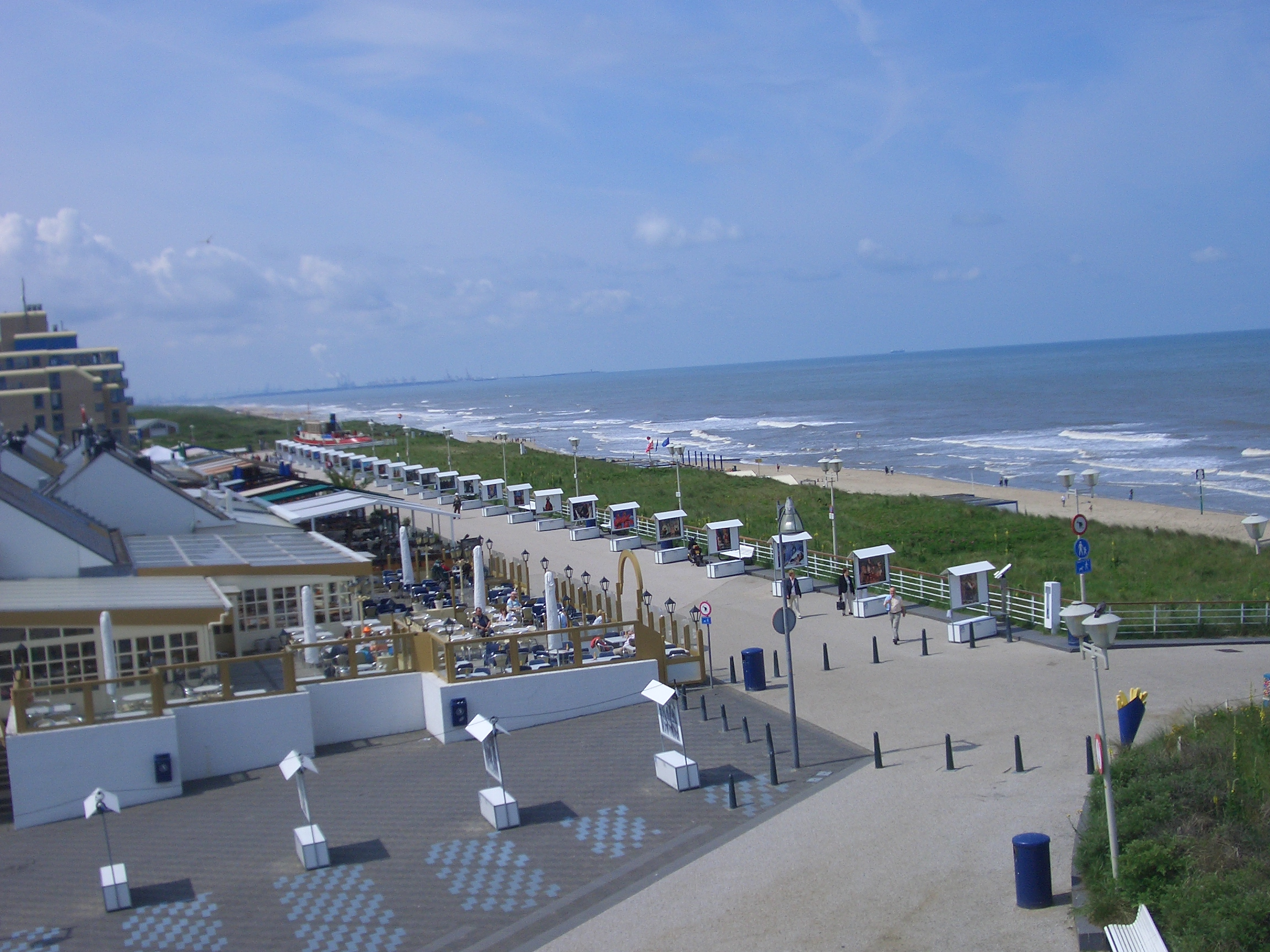 Strandpromenade in Kijduin, Den Haag, Niederlande